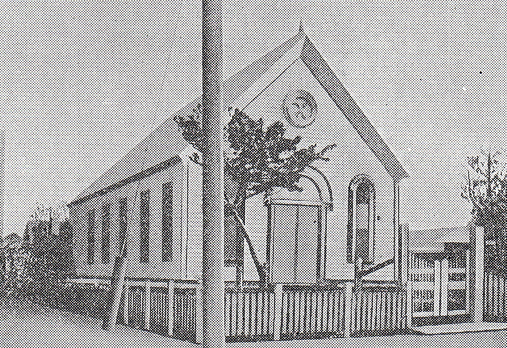 1885年に内村鑑三と藤田九三郎の設計により、竣工した札幌独立教会の教会堂。